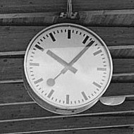 Stationsur på Råcksta T-station i design av Hans Hilfiker